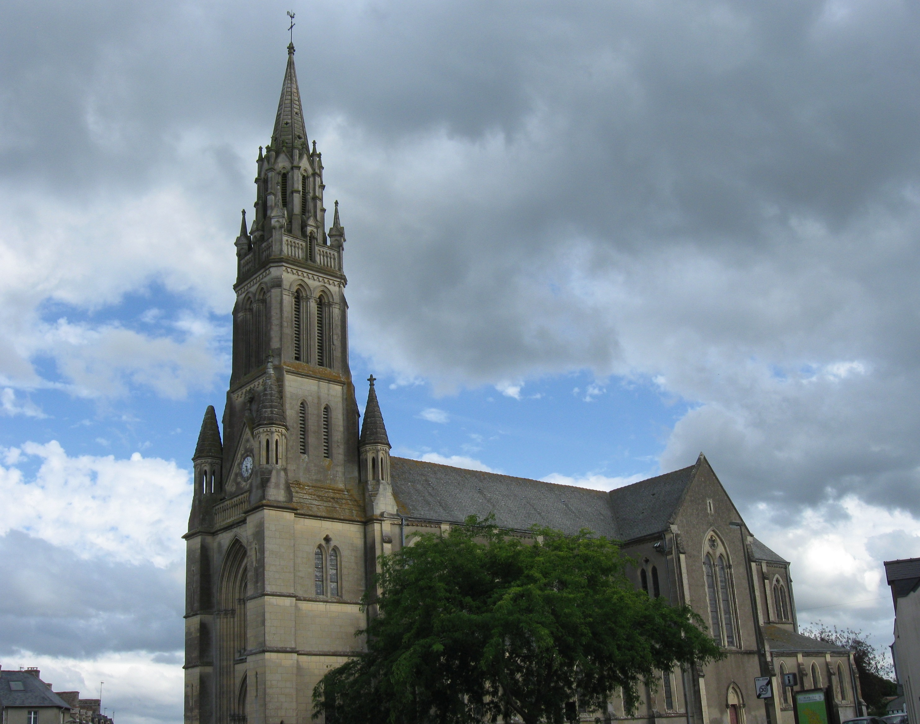 L'église Saint-Pierre de Pluduno. (Côtes-d'Armor, région Bretagne).